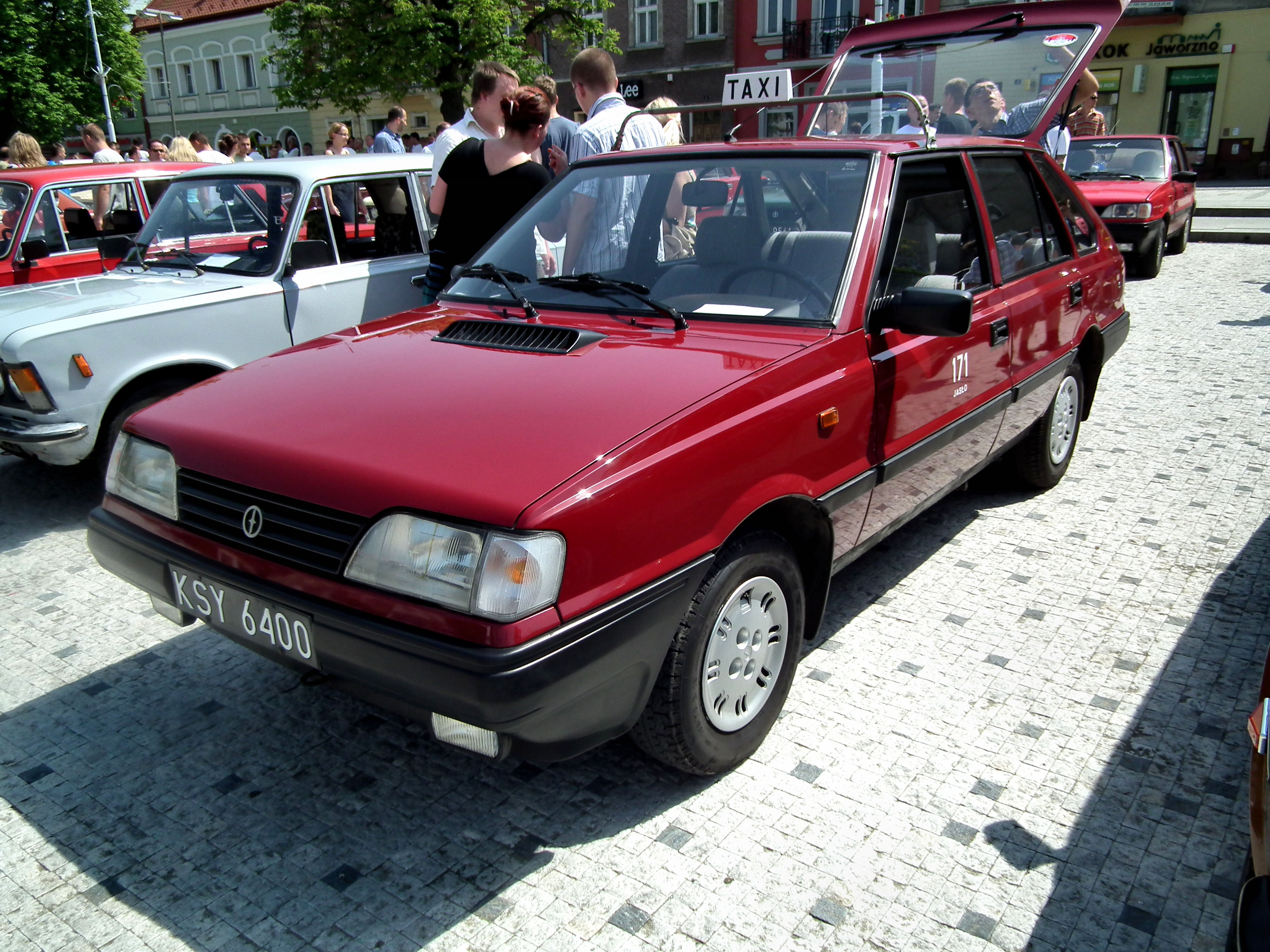 FSO Polonez Caro MR91 1.6 GLE z 1993 roku w Jaśle.